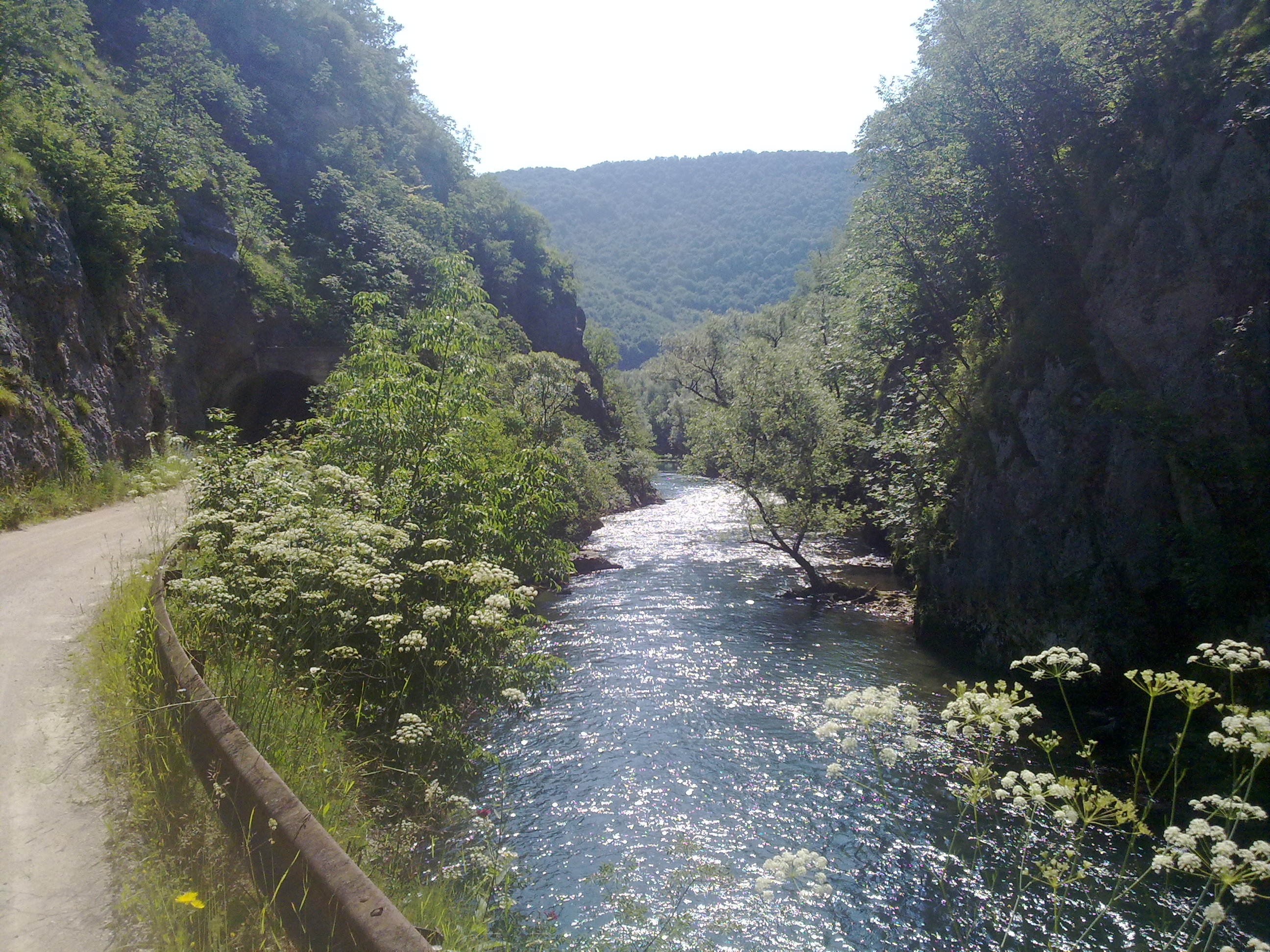 Donja Sanica